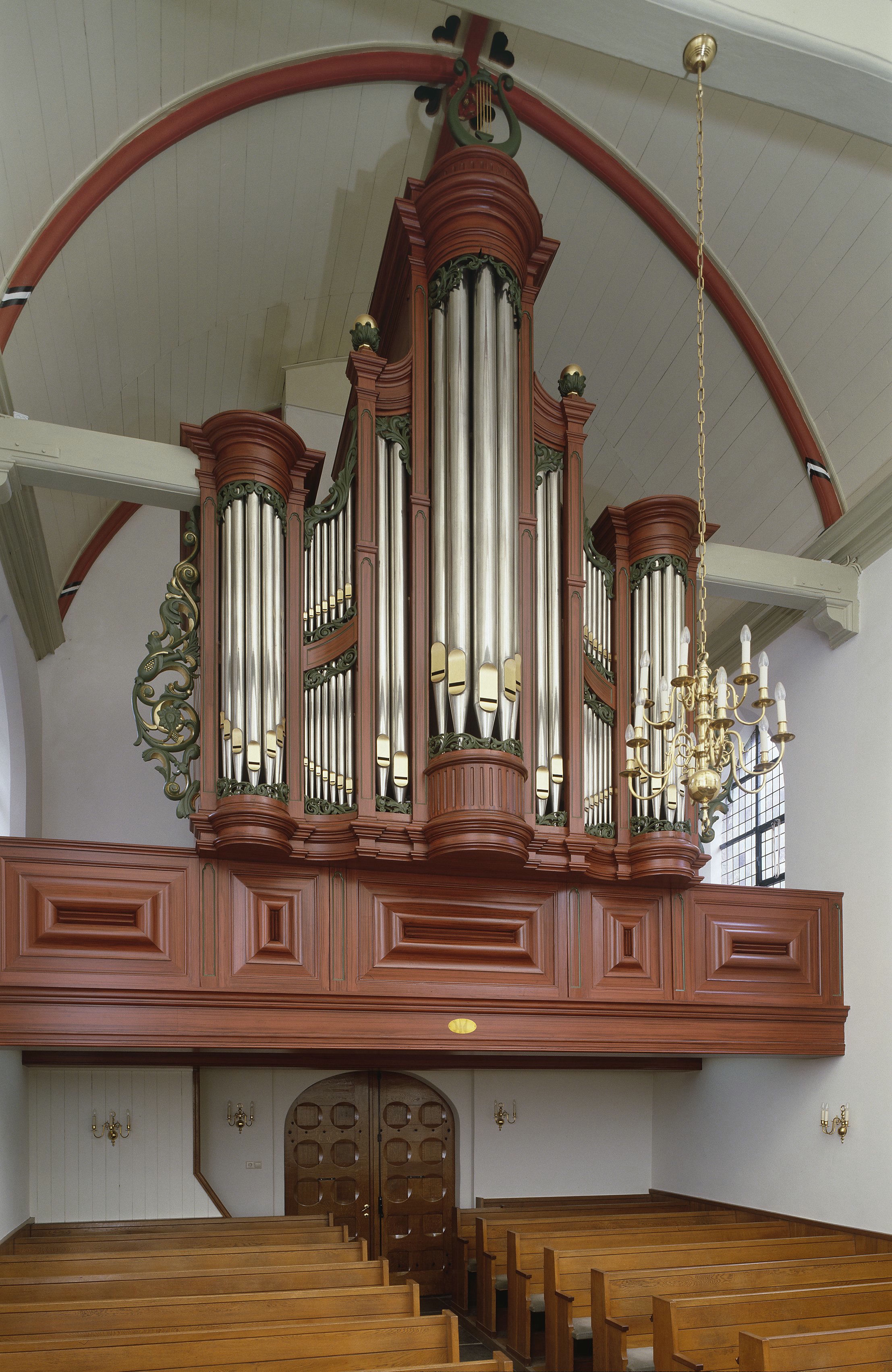 Nederlands Hervormde Kerk: Interieur, aanzicht orgel, orgelnummer 823 (opmerking: Gefotografeerd voor Het Historische Orgel in Nederland 1878-1886, Bladzijde 175)